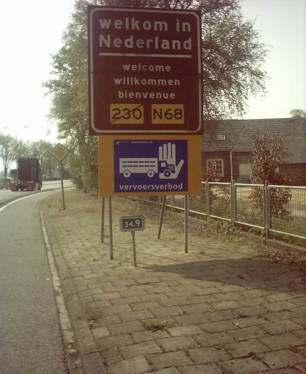 Sign at the border between Germany and the Netherlands. Roermond(NL)/Niederkrüchten-Elmpt(D) Description in de wikipedia: Schild am Grenzübergang Deutschland/Niederlande in Niederkrüchten-Elmpt (Nordrhein-Westfalen) an der Straße Richtung Roermond Quelle: Selbst fotografiert